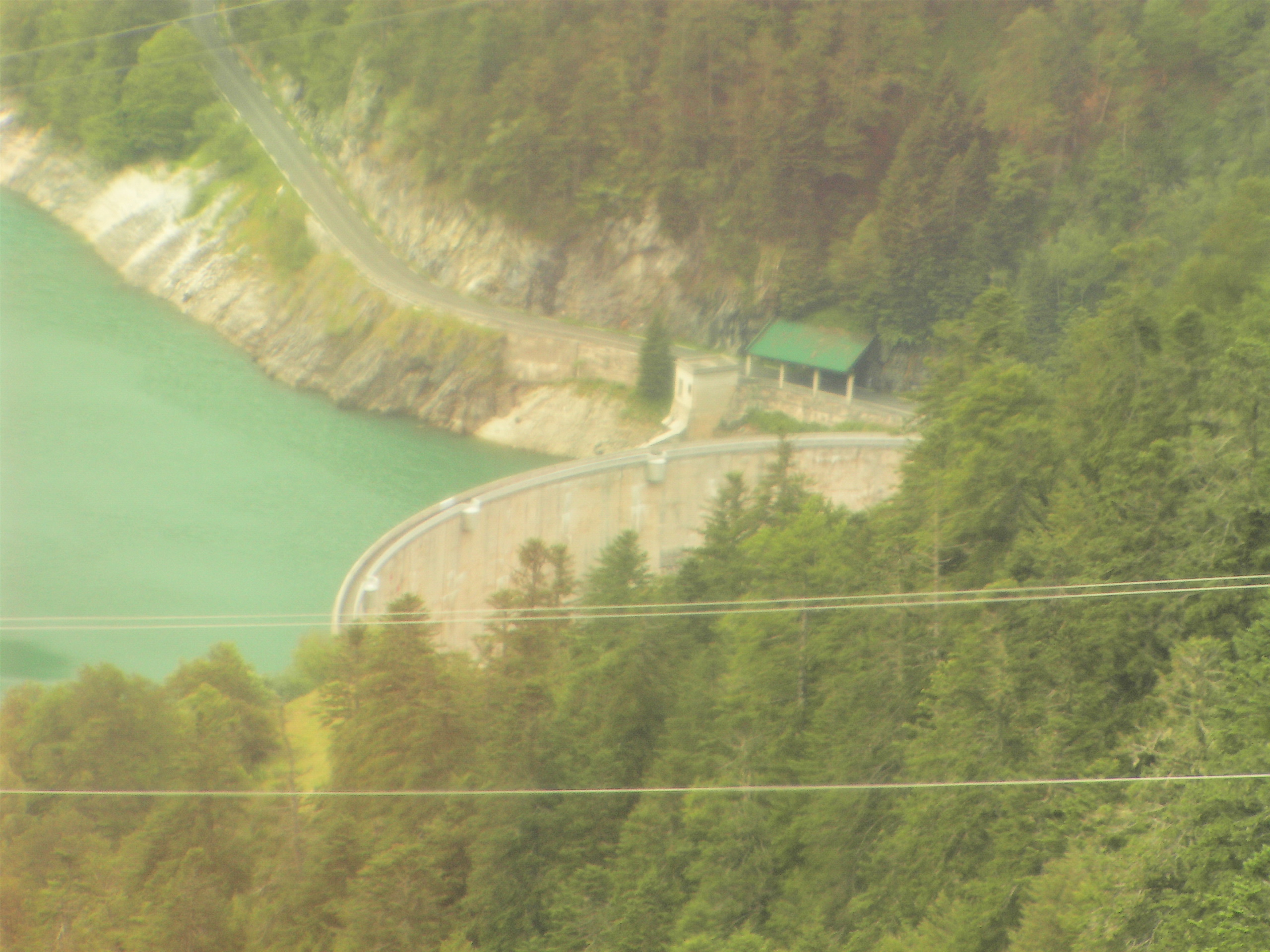 Le barrage de Fabrèges le 25 juillet 2010 depuis le téléphérique d'Artouste.